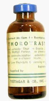 Thorotrast-Flasche